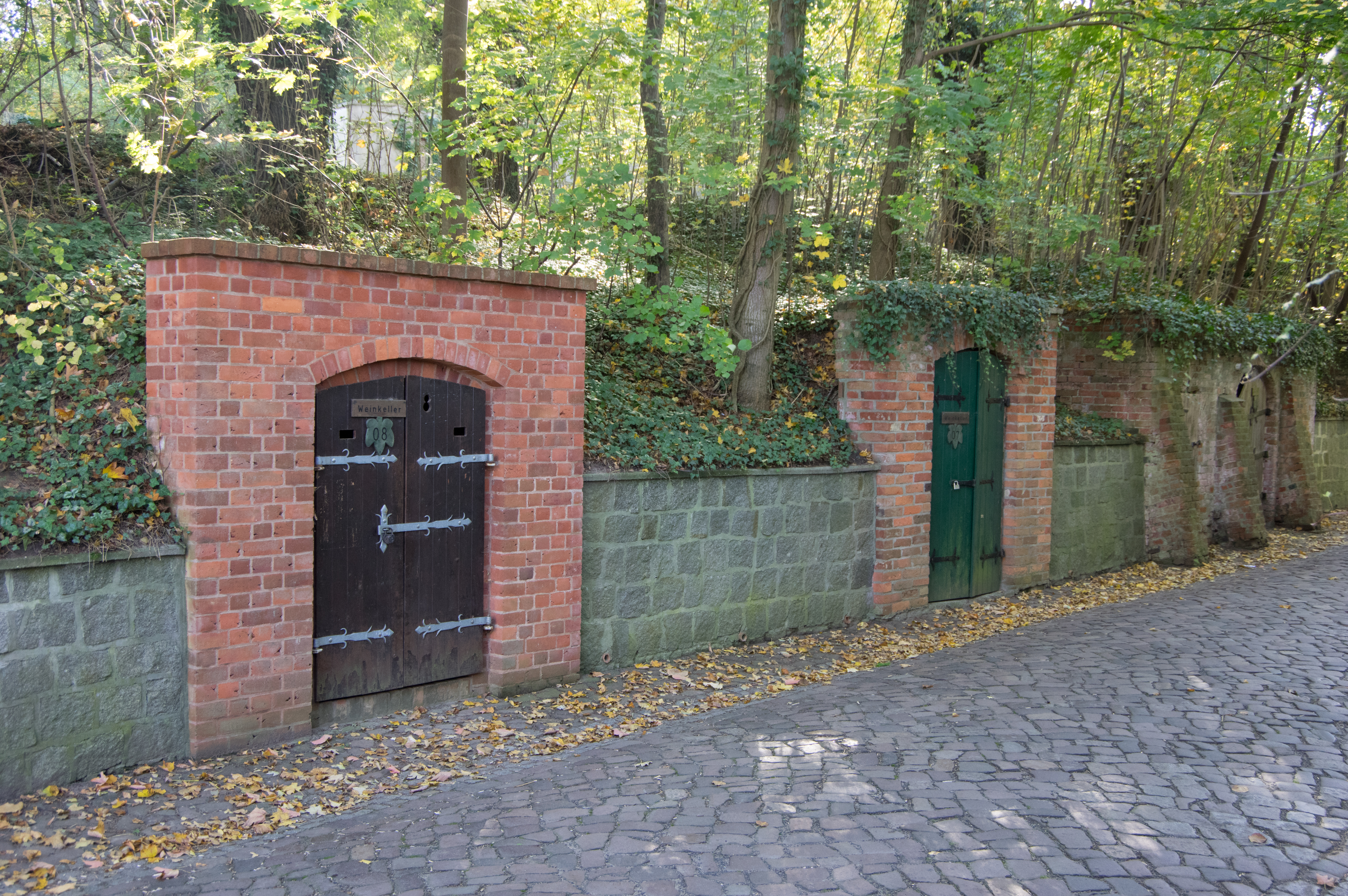 Schlieben in Brandenburg. Die Bergkeller sind denkmalgeschützt.